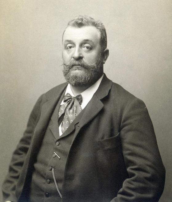 Georg Ritter von Schönerer (1842-1921)